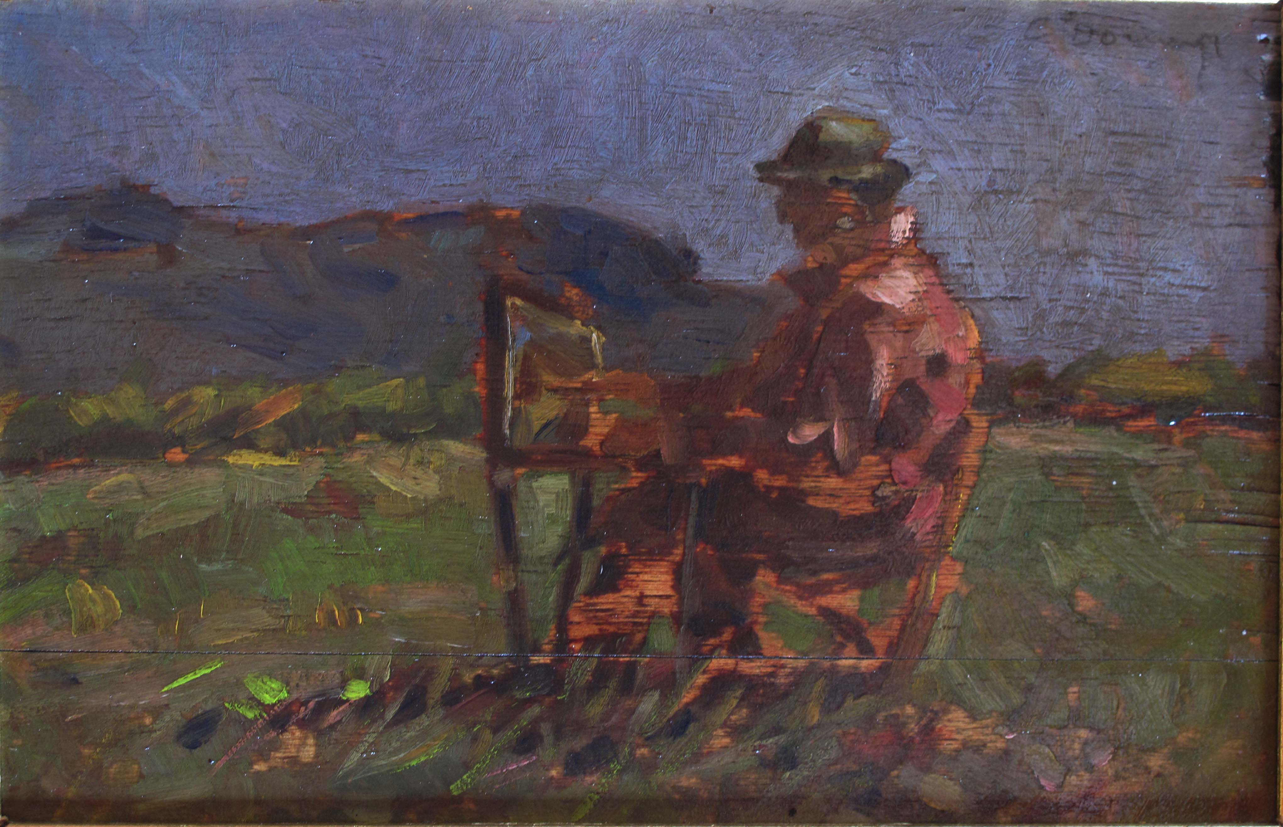 Giovanni Lomi a lavoro olio su tavola dimensione 15x23 cm, firmato in alto a destra - (Lucca, collezione Lorenzo Pacini)